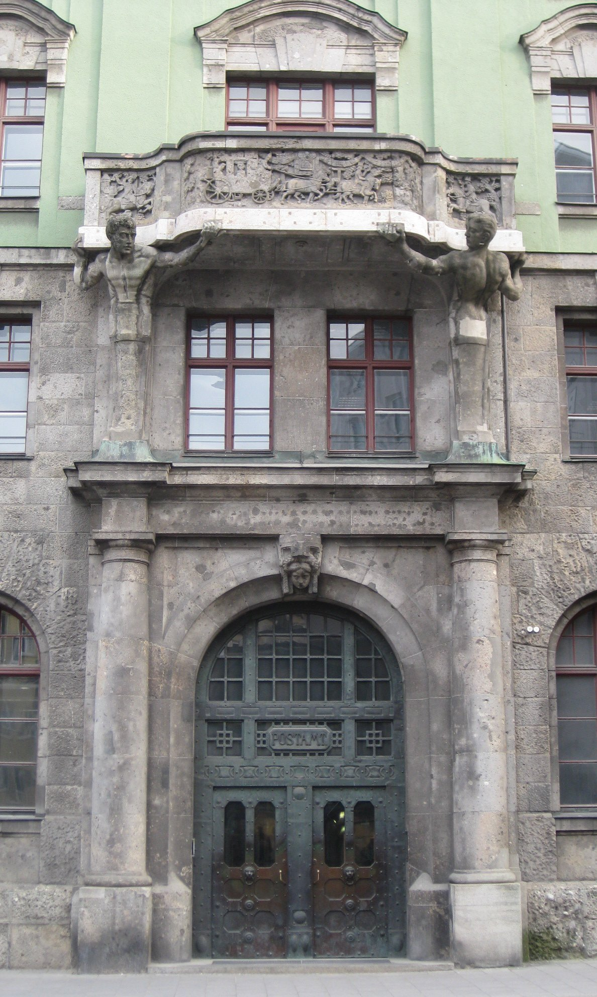 Haupteingang des Postgebäudes (ehemals Oberpostdirektion) in Augsburg.